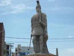 Estatua moderna del Santo Mártir,ubicada al inicio del Boulevard 5 de Julio de Barcelona